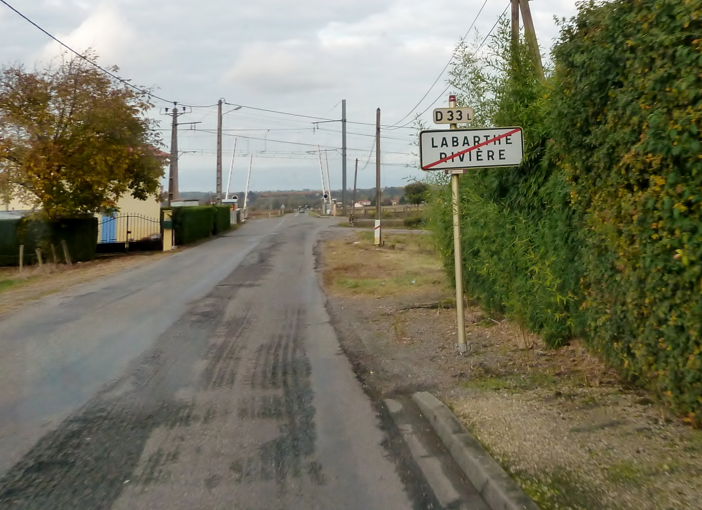 Sortie de Labarthe-Rivière